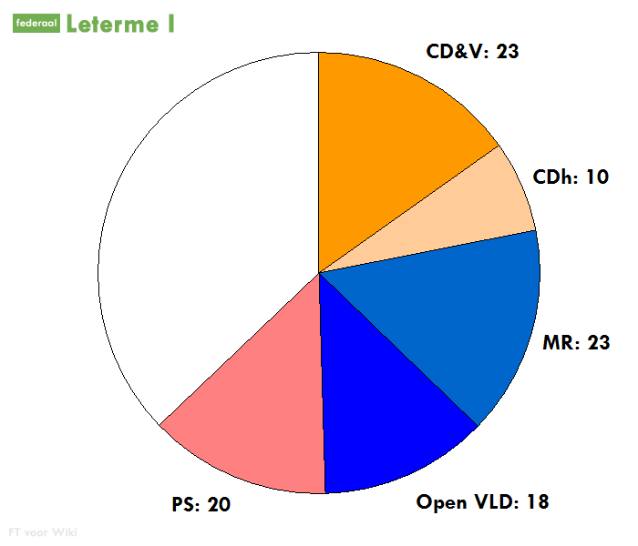 zetelverdeling in de kamer voor de meerderheid van leterme I